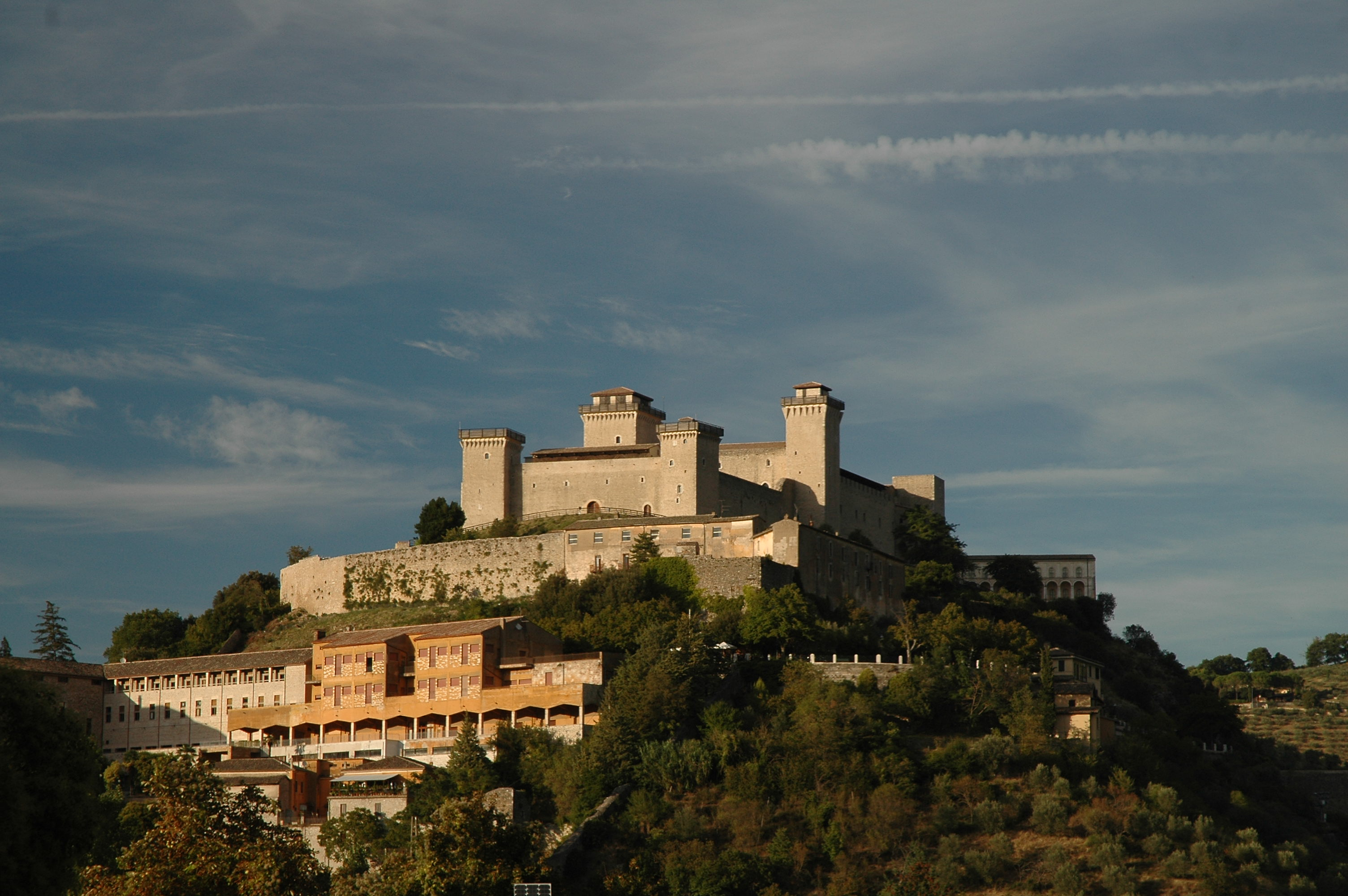 Spoleto